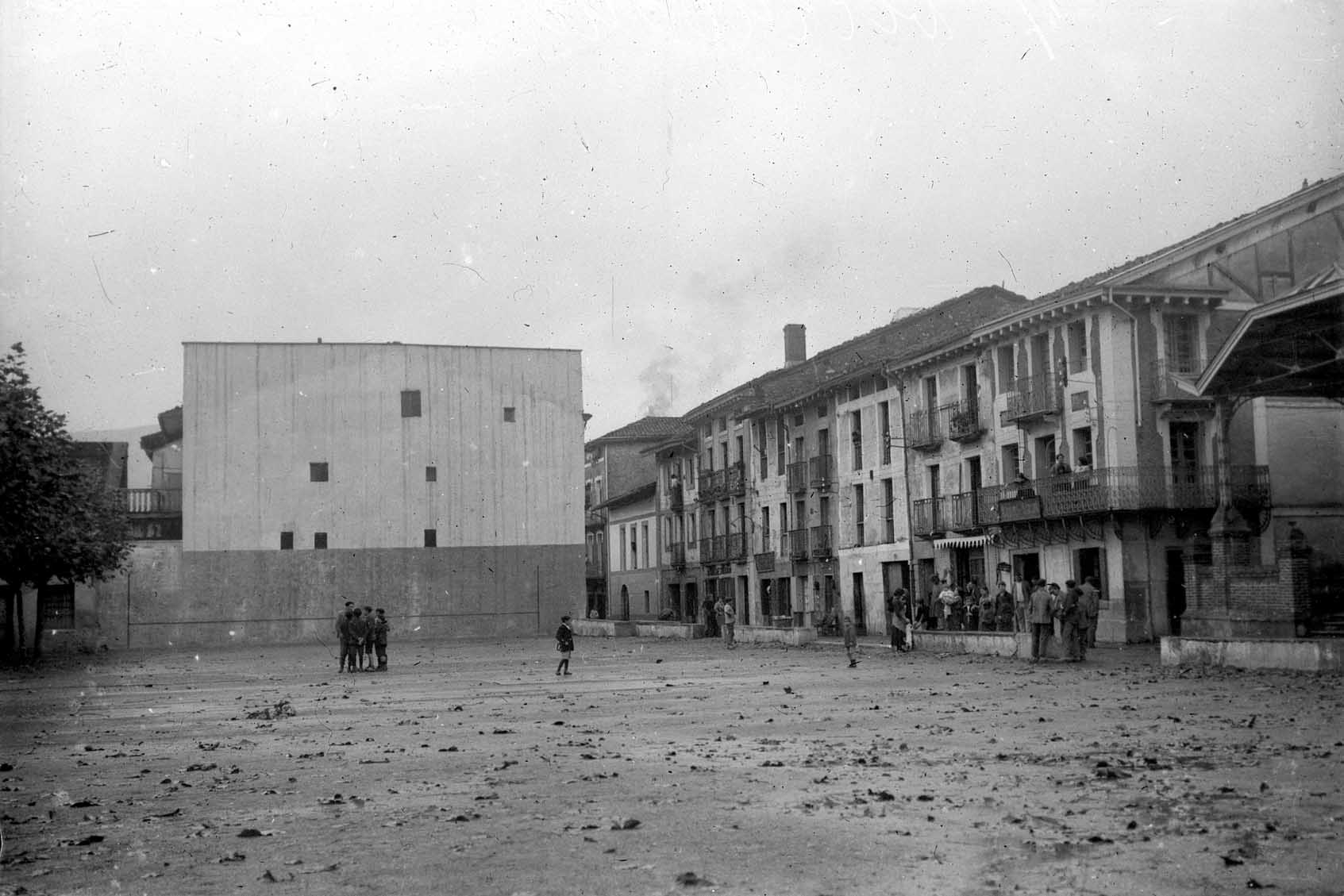 Villabonako XX. mende hasierako herriko plaza eta frontoiaren ikuspegia.